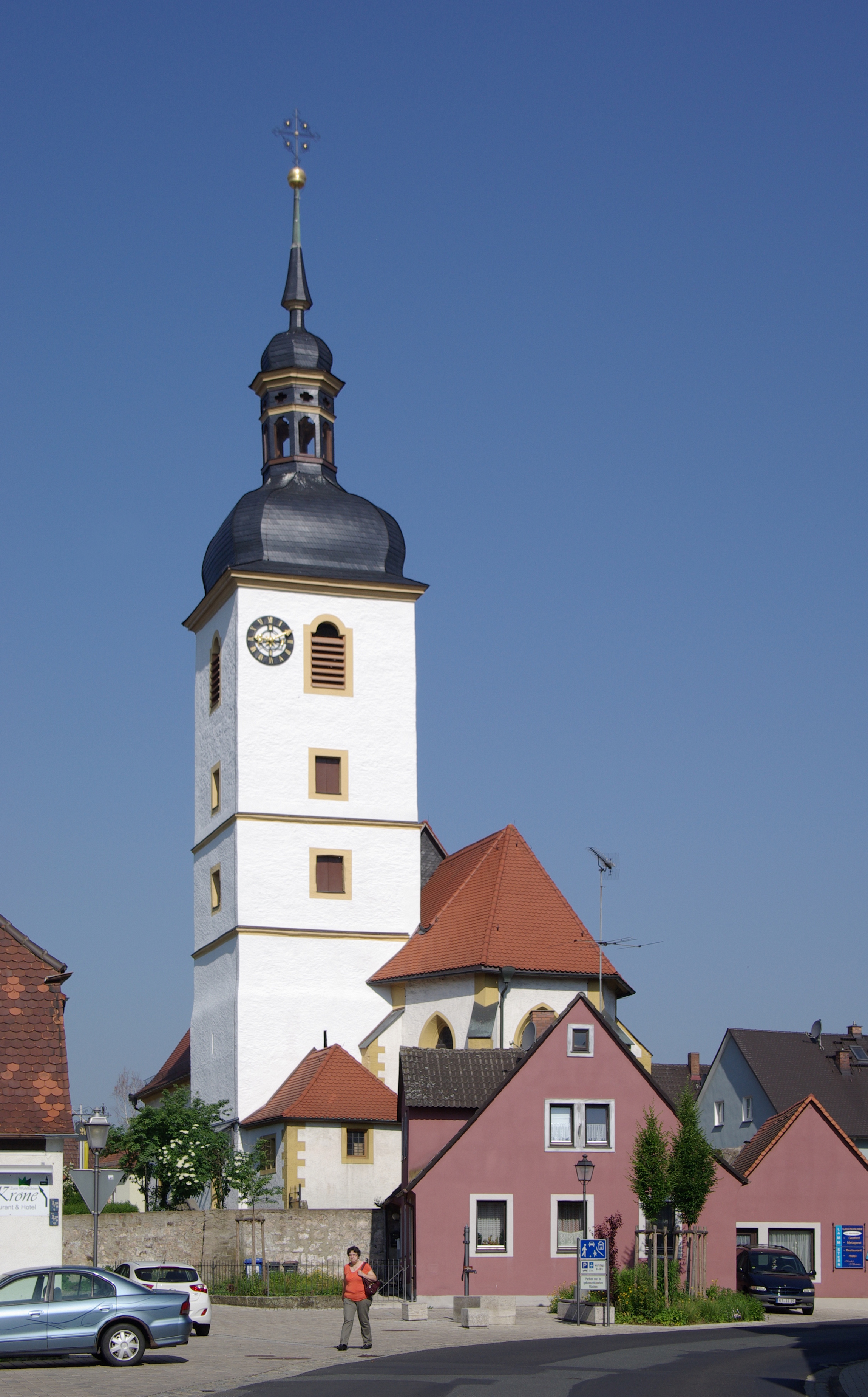 Geiselwind, Pfarrkirche St. Burkhard